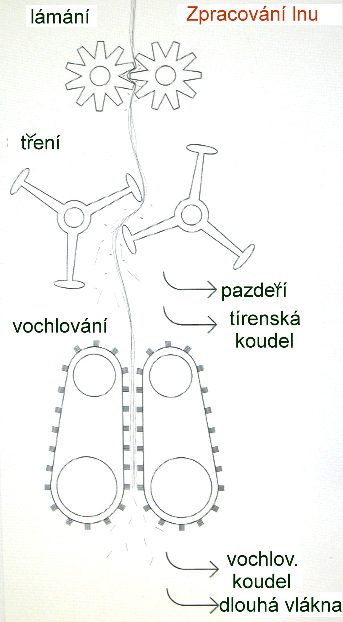 Schema zpracovani lnenych vlaken